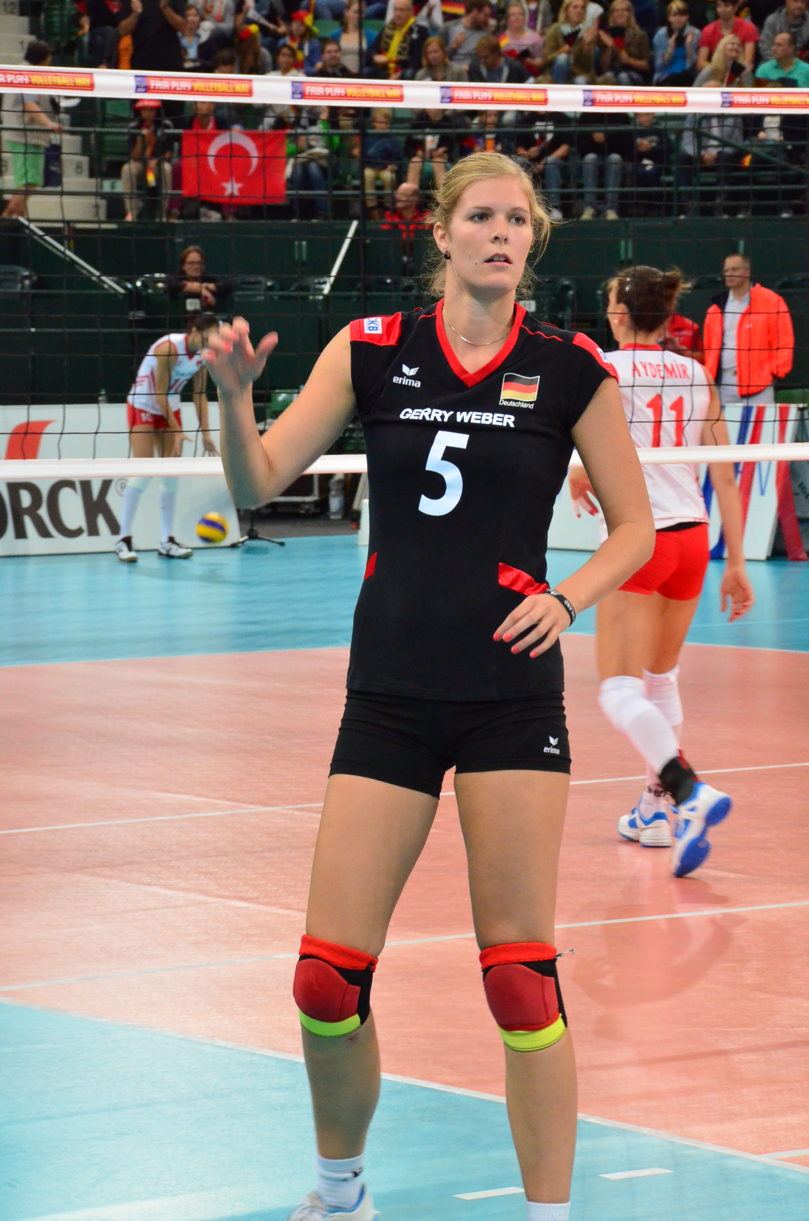 Volleyball-Europameisterschaft der Frauen 2013-Spielort Halle (Westf) Gerry-Weber-Stadion - Spiel 8. September 2013 (Deutschland-Türkei)